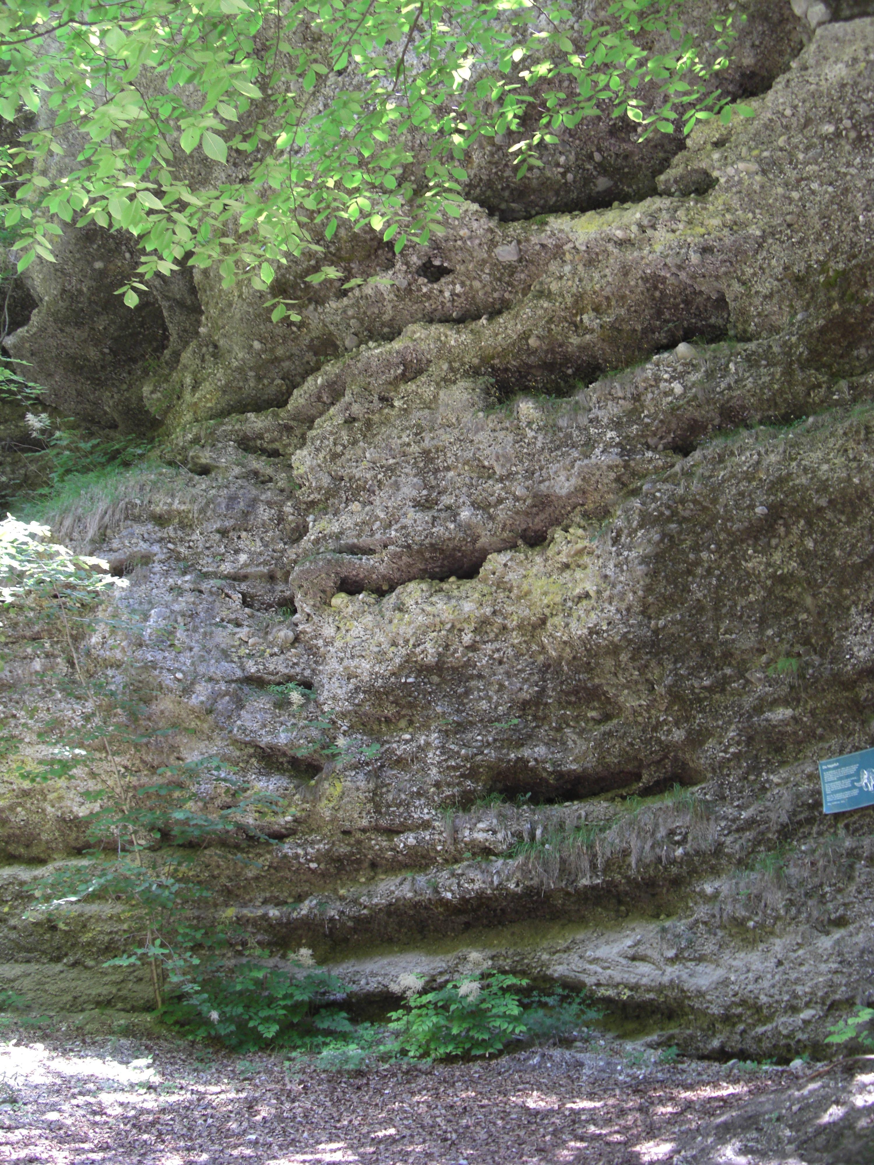 Nagelfluh in der Glasenbachklamm, im Süden der Stadt Salzburg in Österreich